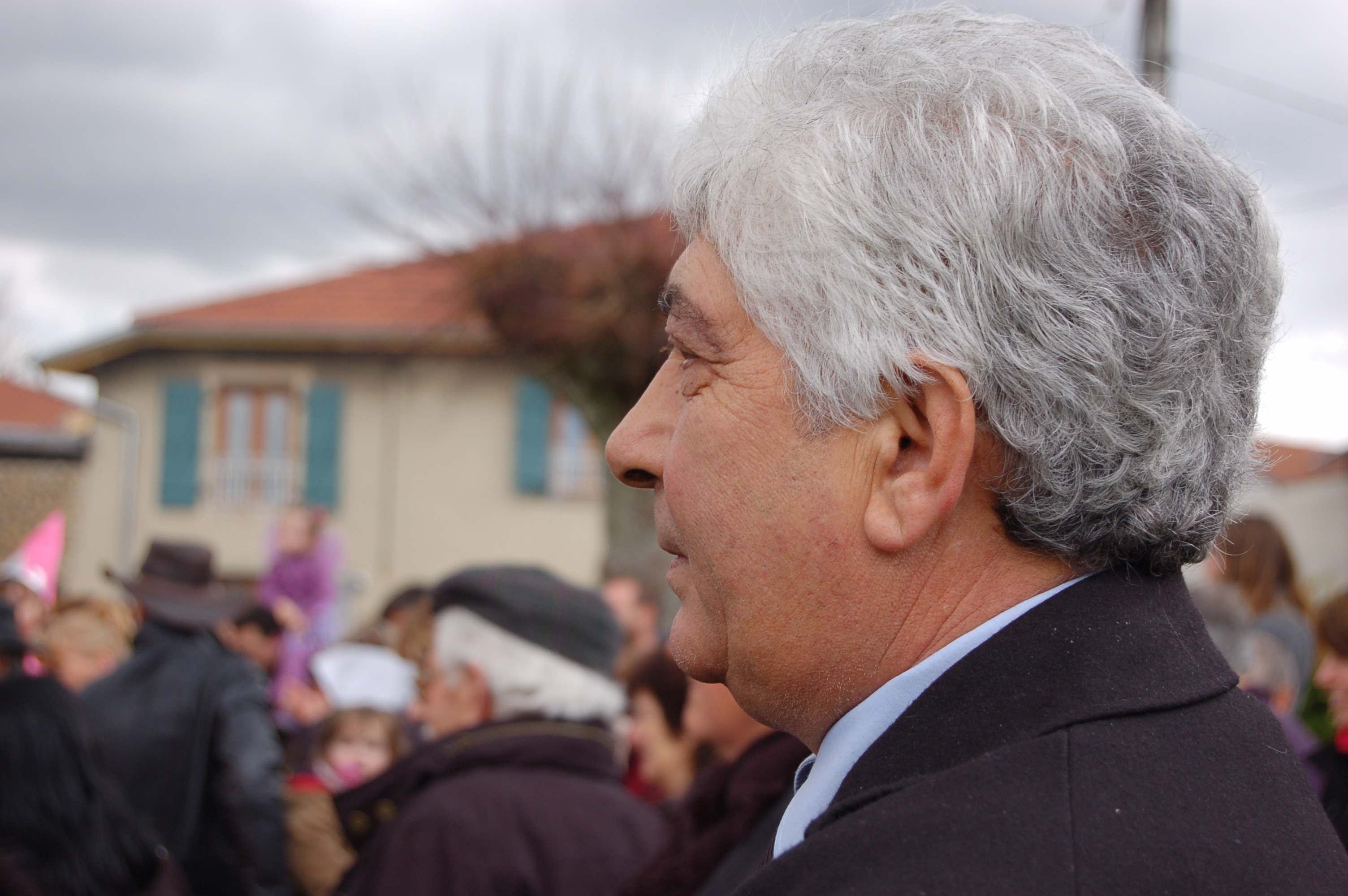 Le maire de Châtenay Pierre Tortosa à la fête du village de Viriville